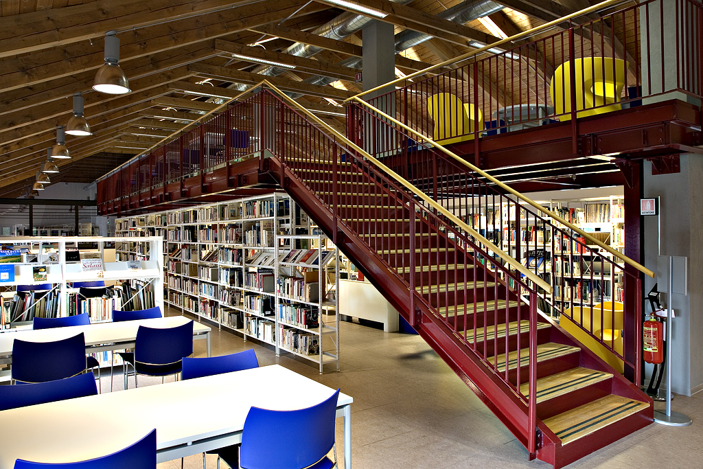 Un interno della Biblioteca civica Italo Calvino